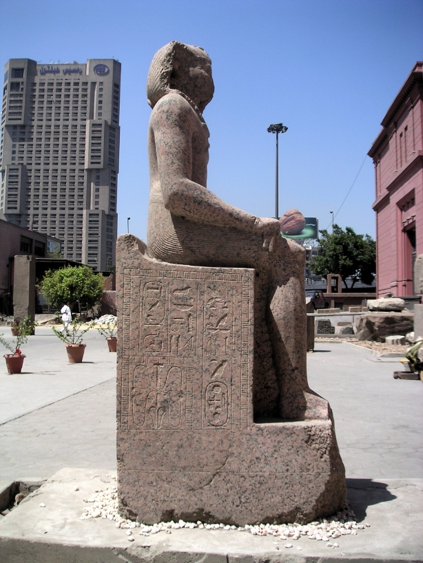 Statue d'Amenemhat Ier - XIIe dynastie égyptienne - Jardin du Musée du Caire